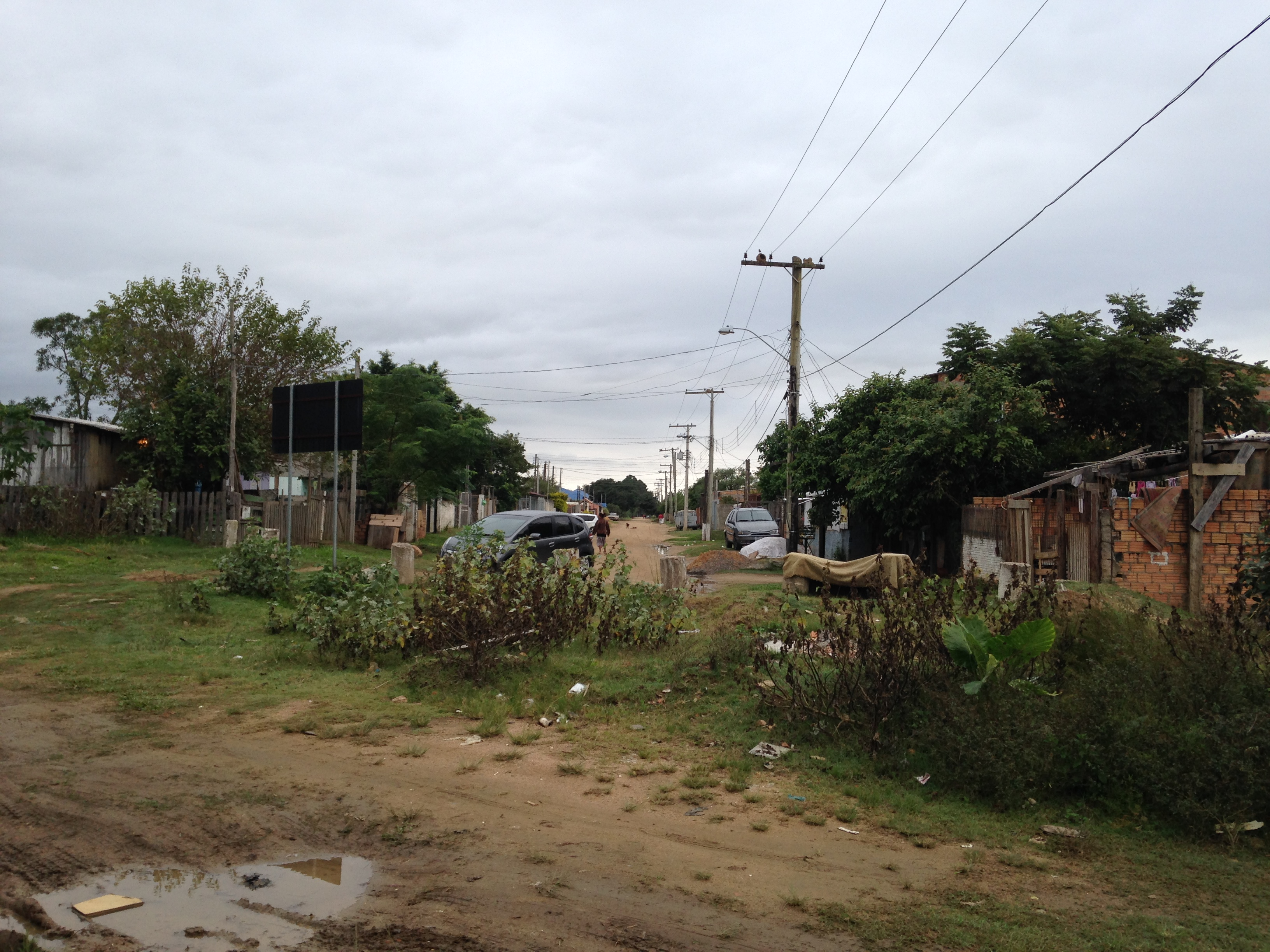 Final do loteamento "Túnel Verde", no Bairro Ponta Grossa, próximo das margens do Arroio do Salso.